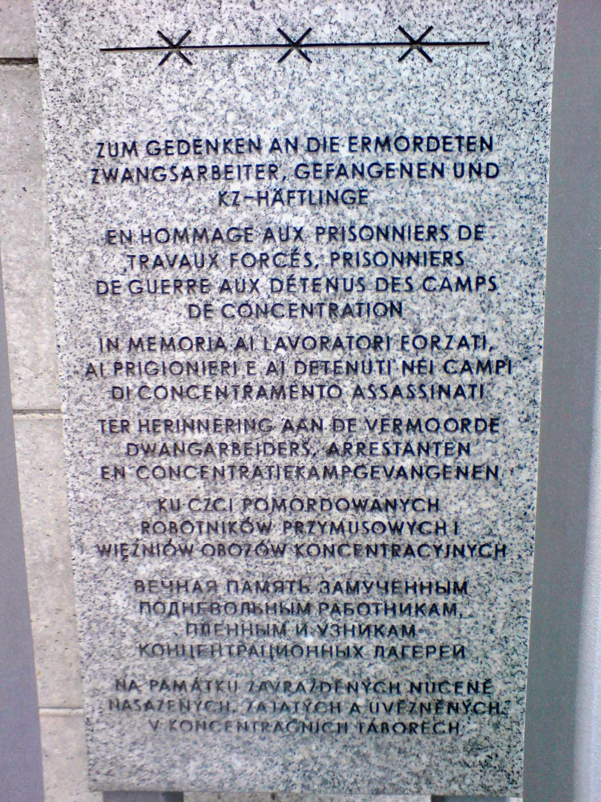 Die Platte umschreibt die Daten zum Lager der Zwangsarbeiterinnen auf dem Gelände der ehemaligen Brinker Eisenwerke